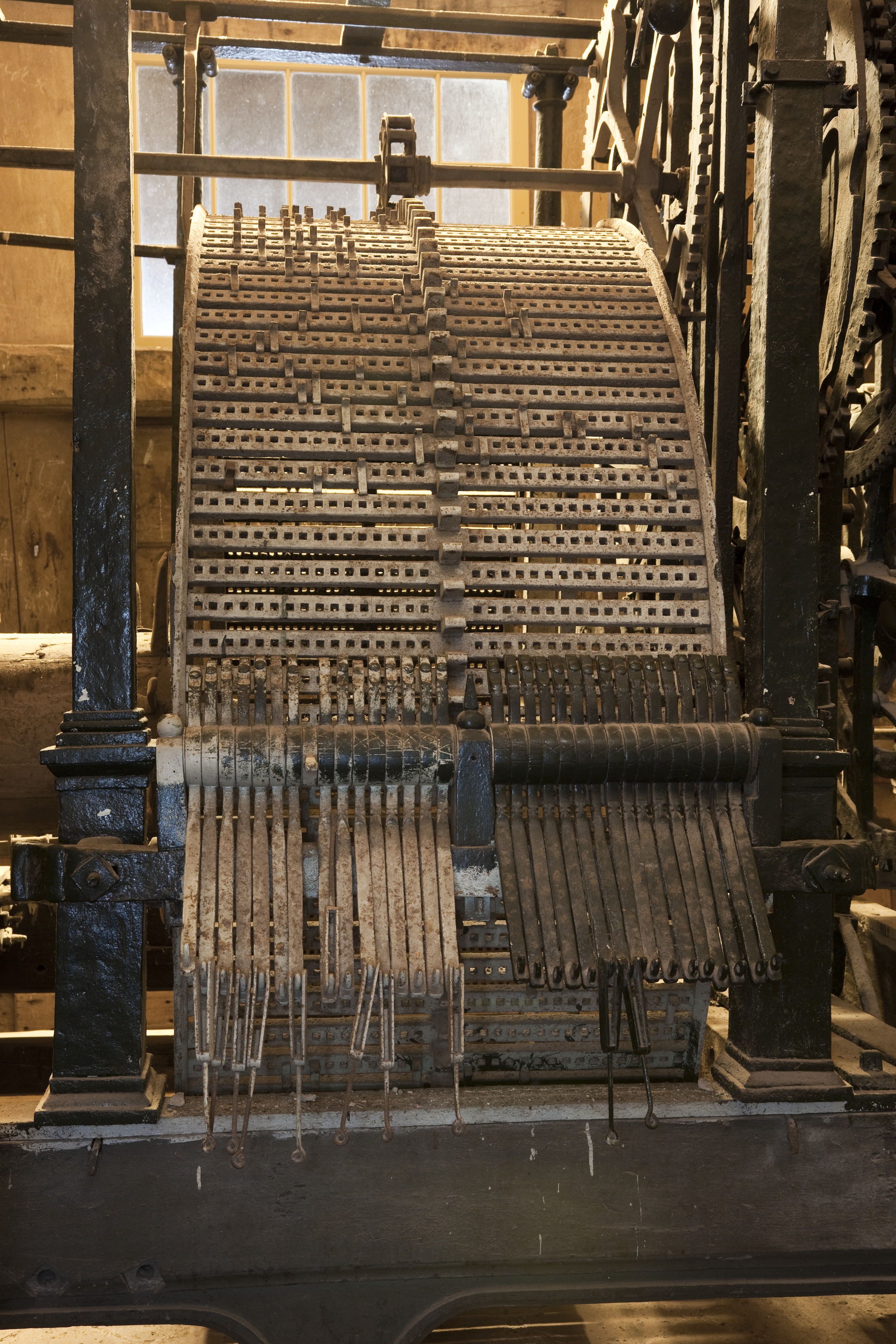 Grote of Sint Catharijnekerk: Interieur toren, begane grond, overzicht van het middenstuk van de achterzijde van het trommelspeelwerk